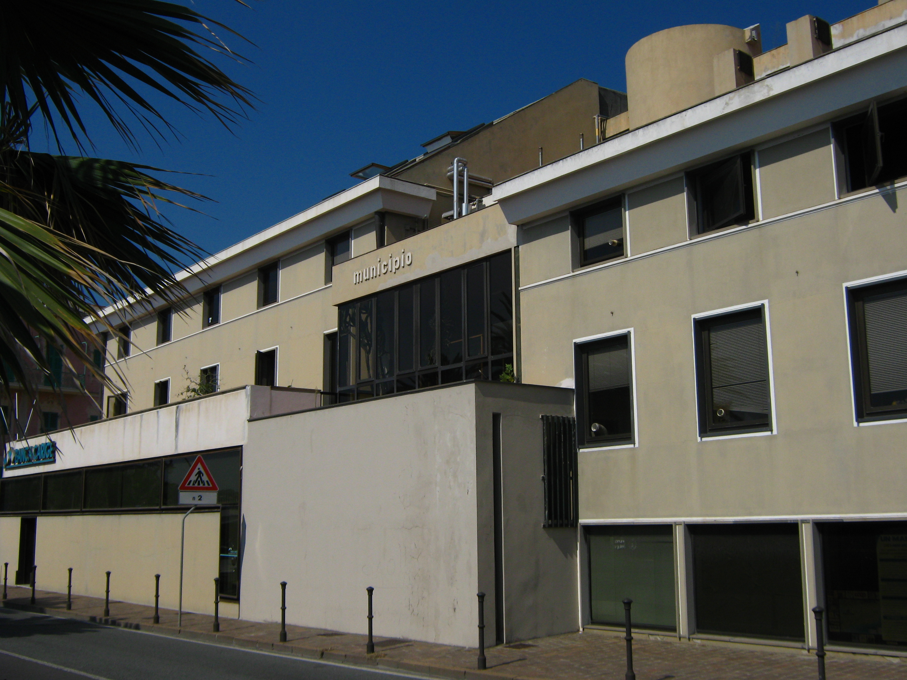 Municipio di Cogoleto, progettato dall'Arch. Piero Gambacciani